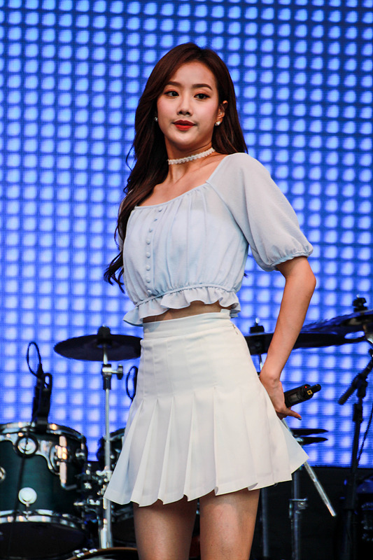 ✔일시 - 8.31(금) 오후 6시 ✔장소 - 홍대걷고싶은거리 (홍대입구역 4번출구) ✔라인업 - 데이브레이크, 소란, 에이프릴, 오리엔탈쇼커스 ✔제주항공X루나와 함께하는 K-POP 댄스리그 결승전 18시에 행사 시작인데 1시간전쯤 홍대역에 도착했습니다. 150석 정도의 좌석에 30여석 정도 빈자리가 남아있었는데 대부분 물병이나 가방 등으로 자리를 맡아놓은 것이었습니다. 18시가 조금 넘어 에이프릴(멤버 : 윤채경, 김채원, 이나은, 양예나, 레이첼, 이진솔) 공연으로 행사가 시작되었습니다. 20분정도의 공연이 끝나고 K-POP 댄스리그 결승전이 있었습니다. 커버댄스 공연이었는데 한팀이 여러개의 곡을 보여주었습니다. 에이티나인 EchoDance HK - 홍콩에서 온 팀이었습니다. HACKER crew ONOFF - 유일한 남자팀이었습니다. 댄스리그 결과및 나머지 공연도 못보고 돌아왔습니다. ^^ 상이 4개라서 전부 하나씩 받았을텐데 검색을 해도 에이티나인팀이 루나 뷰스타상을 받았다는 것 외에 다른 팀 결과를 찾기 어렵네요.